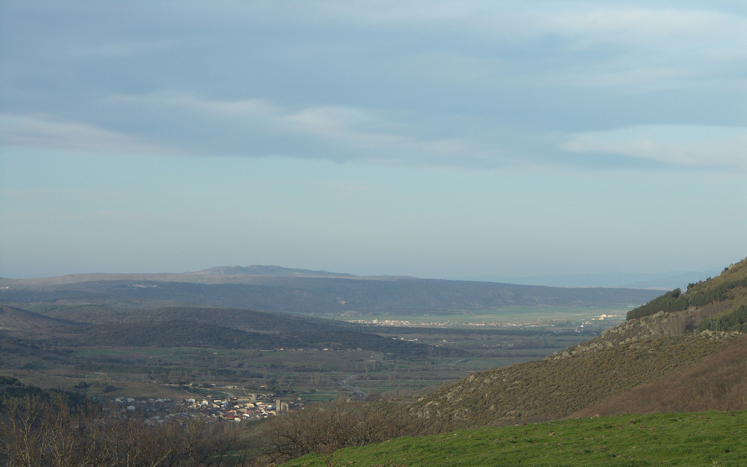 Valle de Amblés desde Villatoro (Ávila, España)